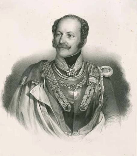 Ferdinand von Parseval (1791-1854), bayerischer Generalmajor, abgebildet als bayerischer Kürassier mit dem preussischen Johanniterorden. (Auf der Quellenwebseite ist das Bild fälschlich als sein Sohn Maximilian von Parseval (1823-1902) bezeichnet.)